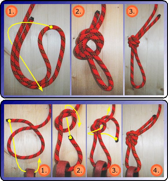 Gelegter und gesteckter Sackstich